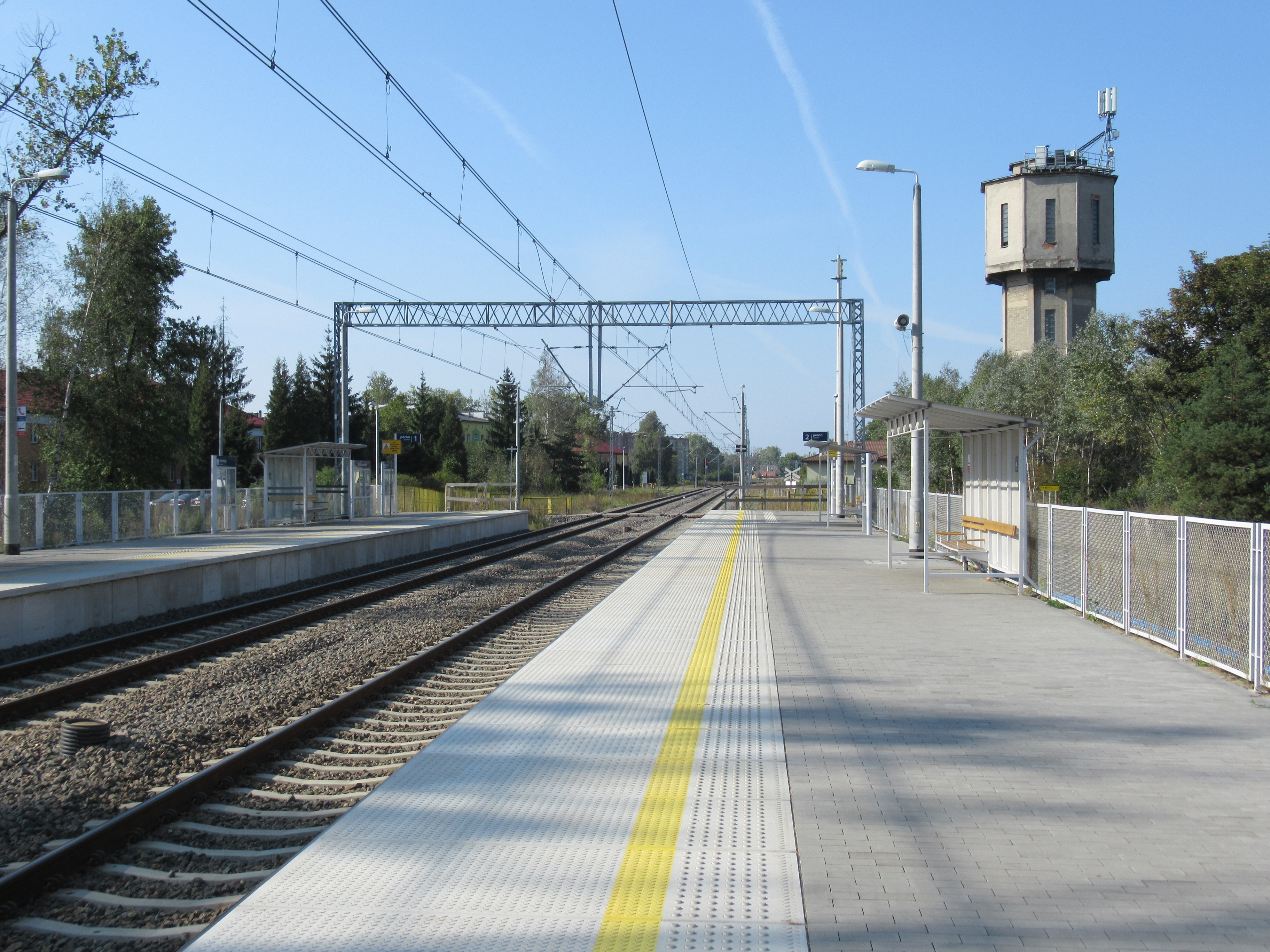 Małaszewicze (gm. Terespol, pow. bialski, woj. lubelskie, Polska). Przystanek kolejowy.